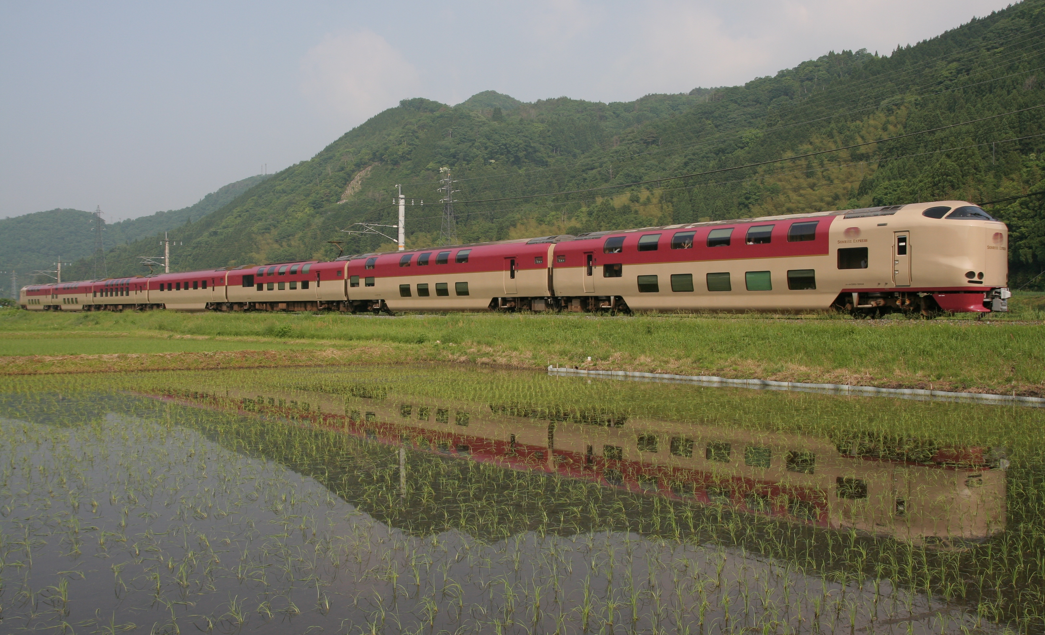 JR西日本285系電車サンライズ出雲 伯備線、黒坂-根雨